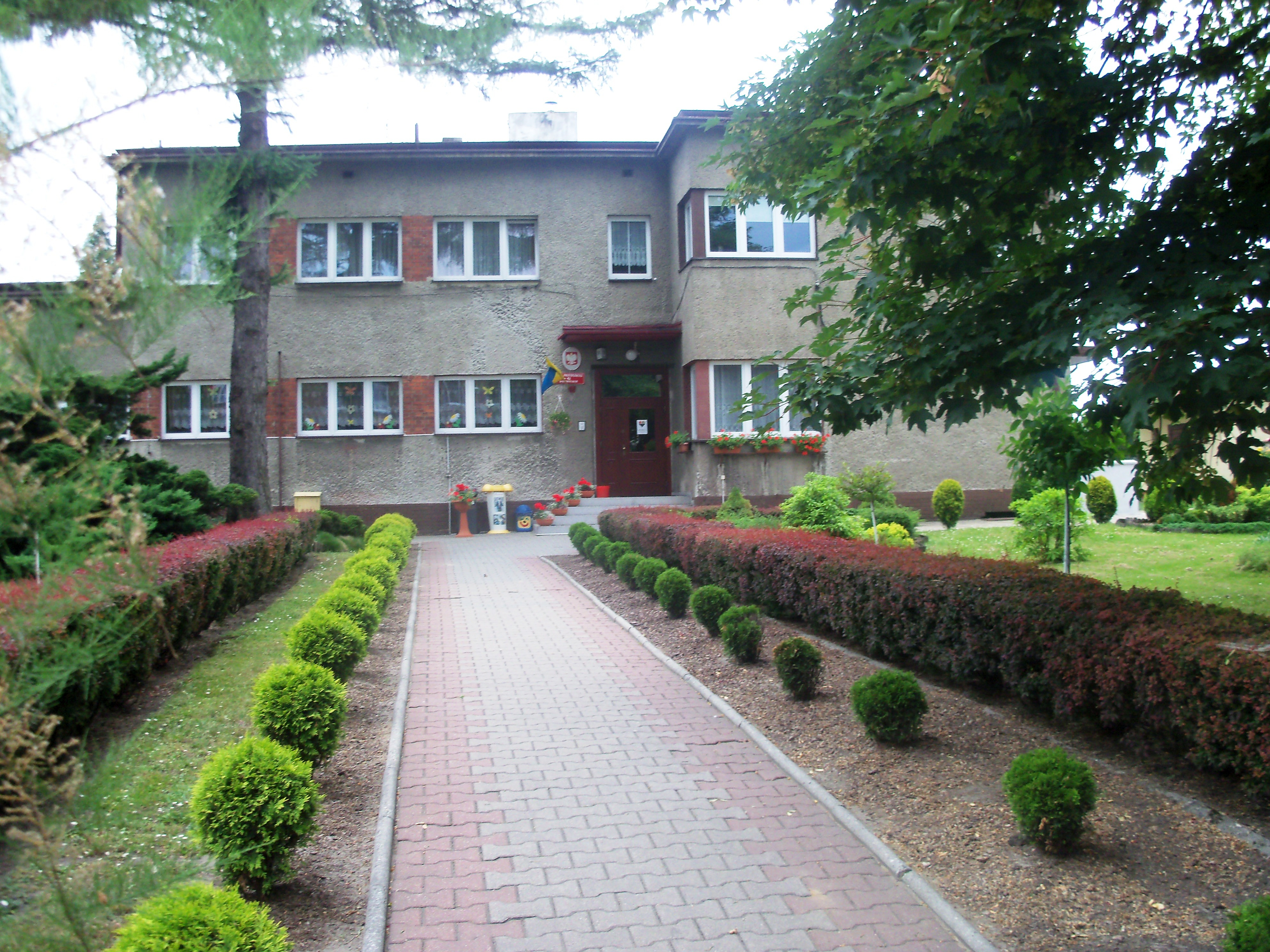 Katowice-Kostuchna: Budynek Miejskiego Przedszkola nr 42 przy ul. T. Boya-Żeleńskiego 30